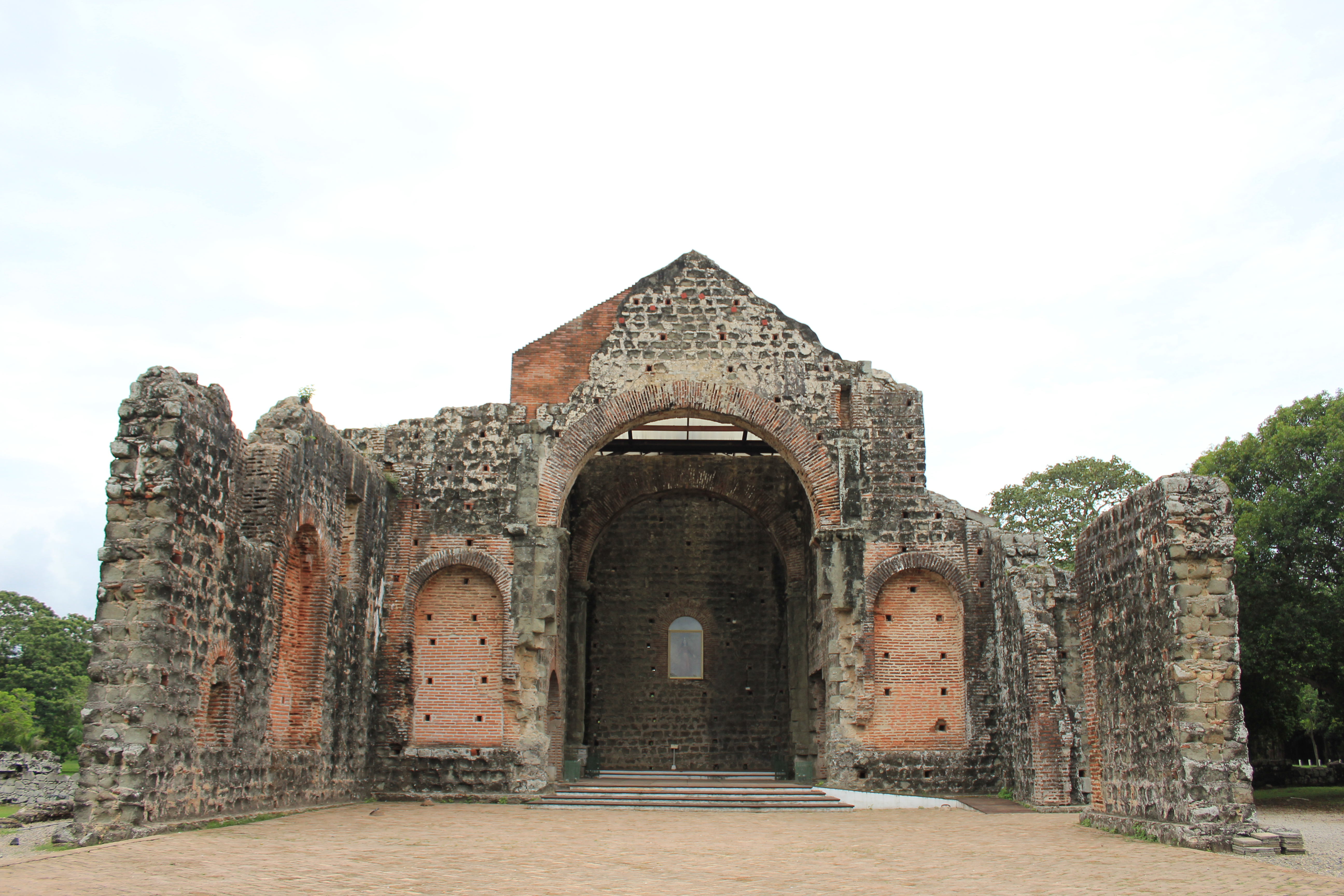 Conjunto Monumental Histórico de Panamá Viejo, Panamá. Declarado Patrimonio de la Humanidad por UNESCO.